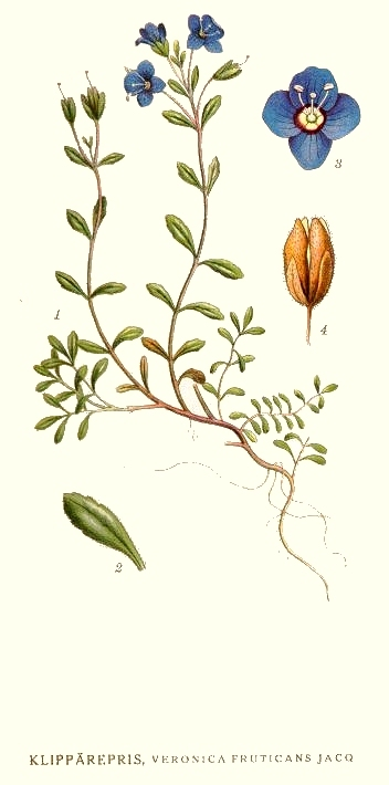 Original Description Klippärepris, Veronica fruticans Jacq.